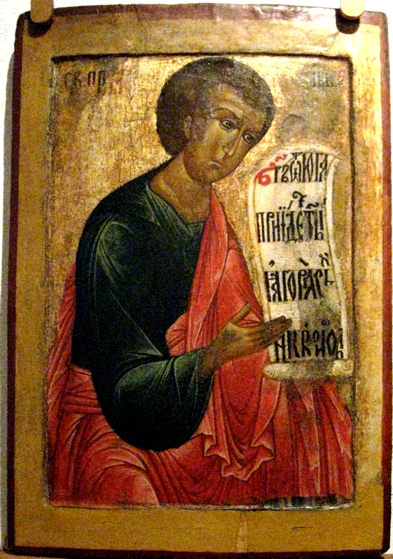 Пророк Аввакум. Иконописец Терентий Фомин (?) Вологда (уп. 1646–1670). Церковь Епифания Кипрского Кирилло-Белозерского монастыря